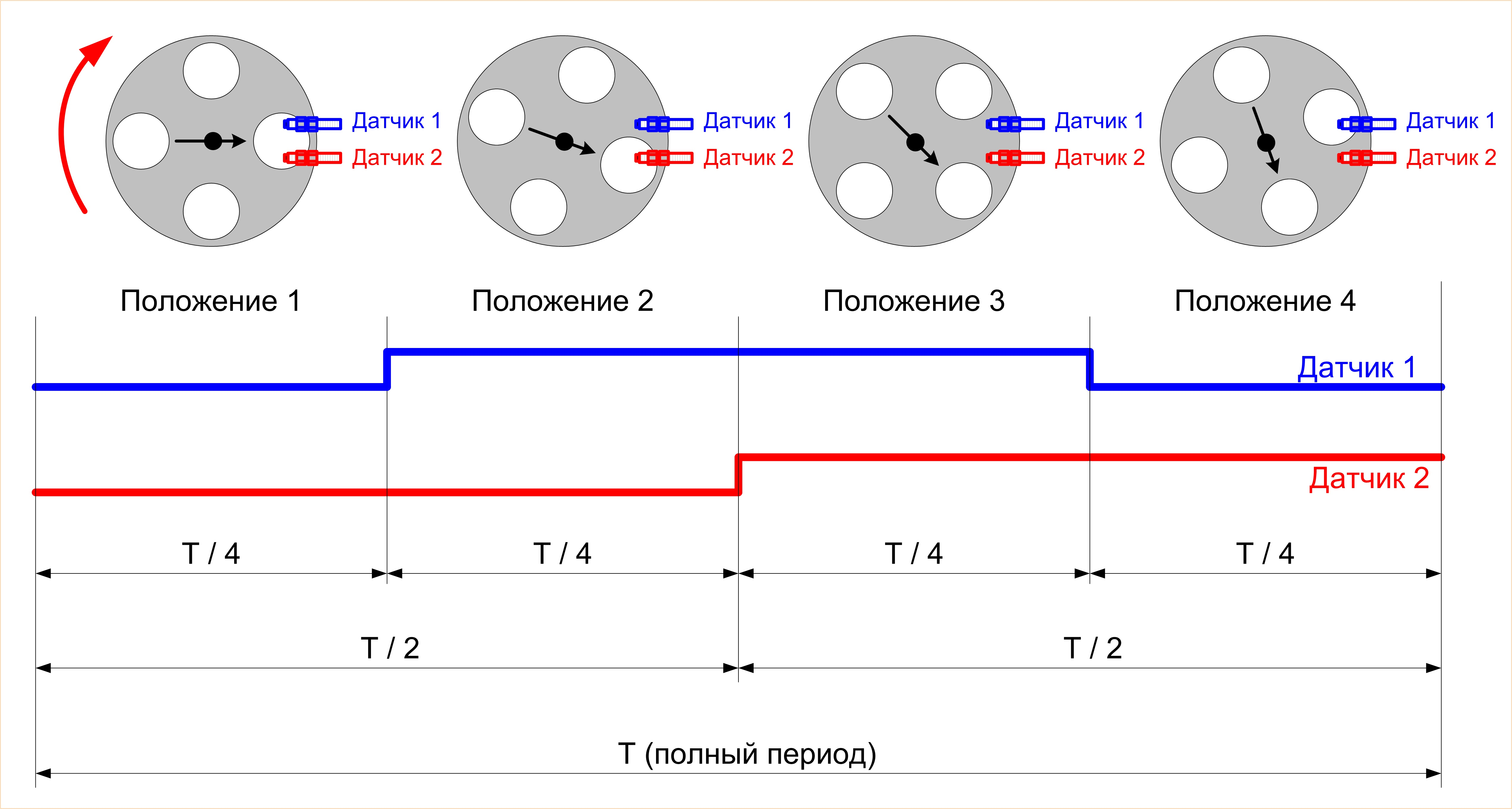 электронный счетчик импульсов ИД-2, реверсивный режим работы с двухканальным энкодером или двумя индуктивными датчиками